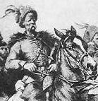 Longinus Podbipięta Julius Kossak egyik metszetén.